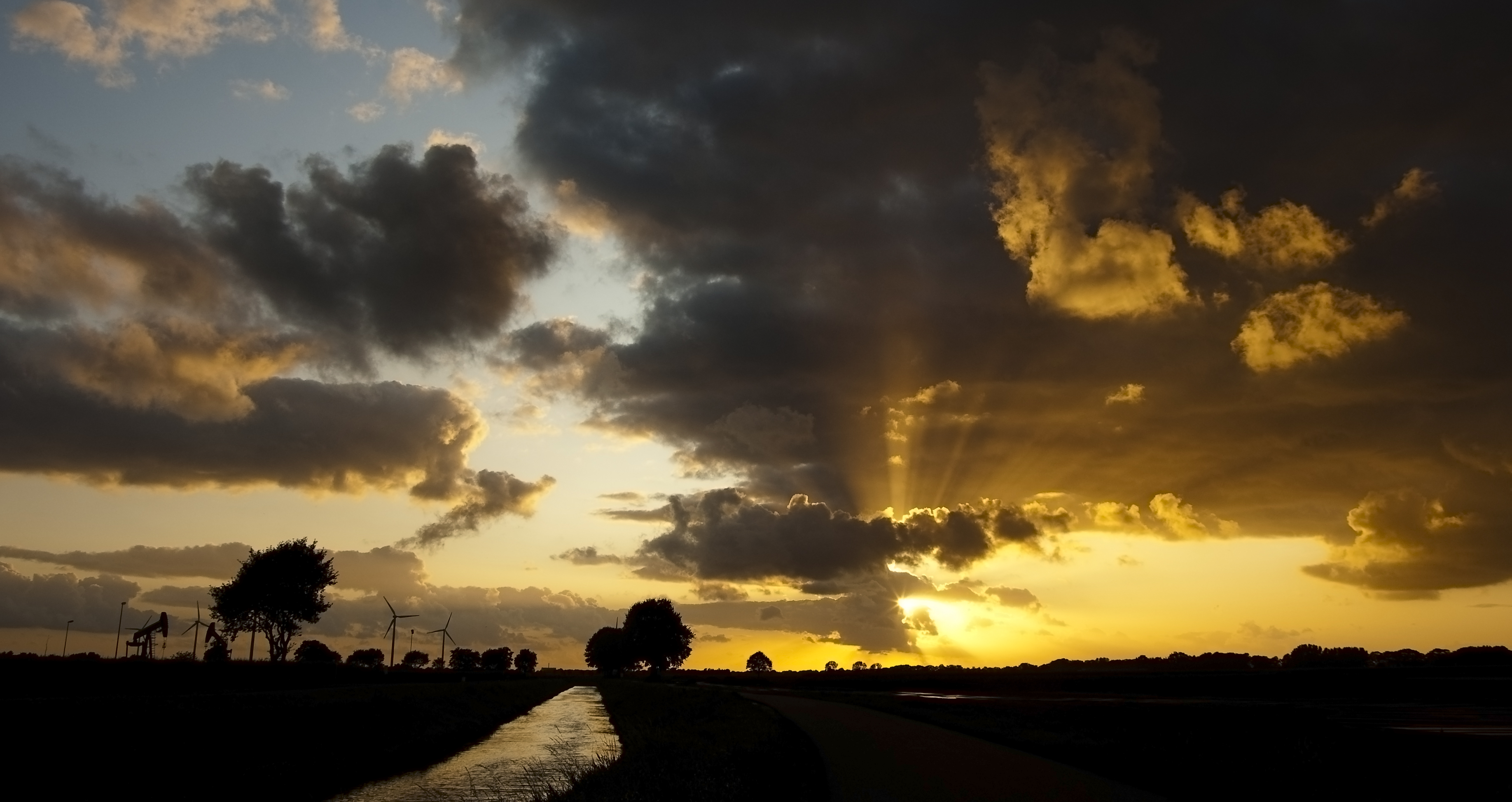 schoonebeek, Schoonebeker Diep